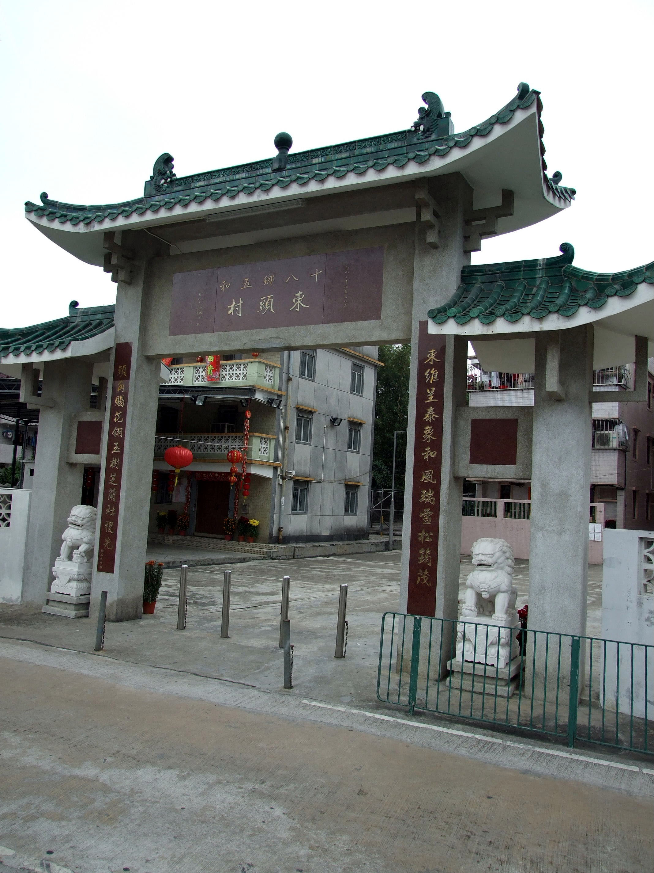 中文（香港）: 東頭村牌樓